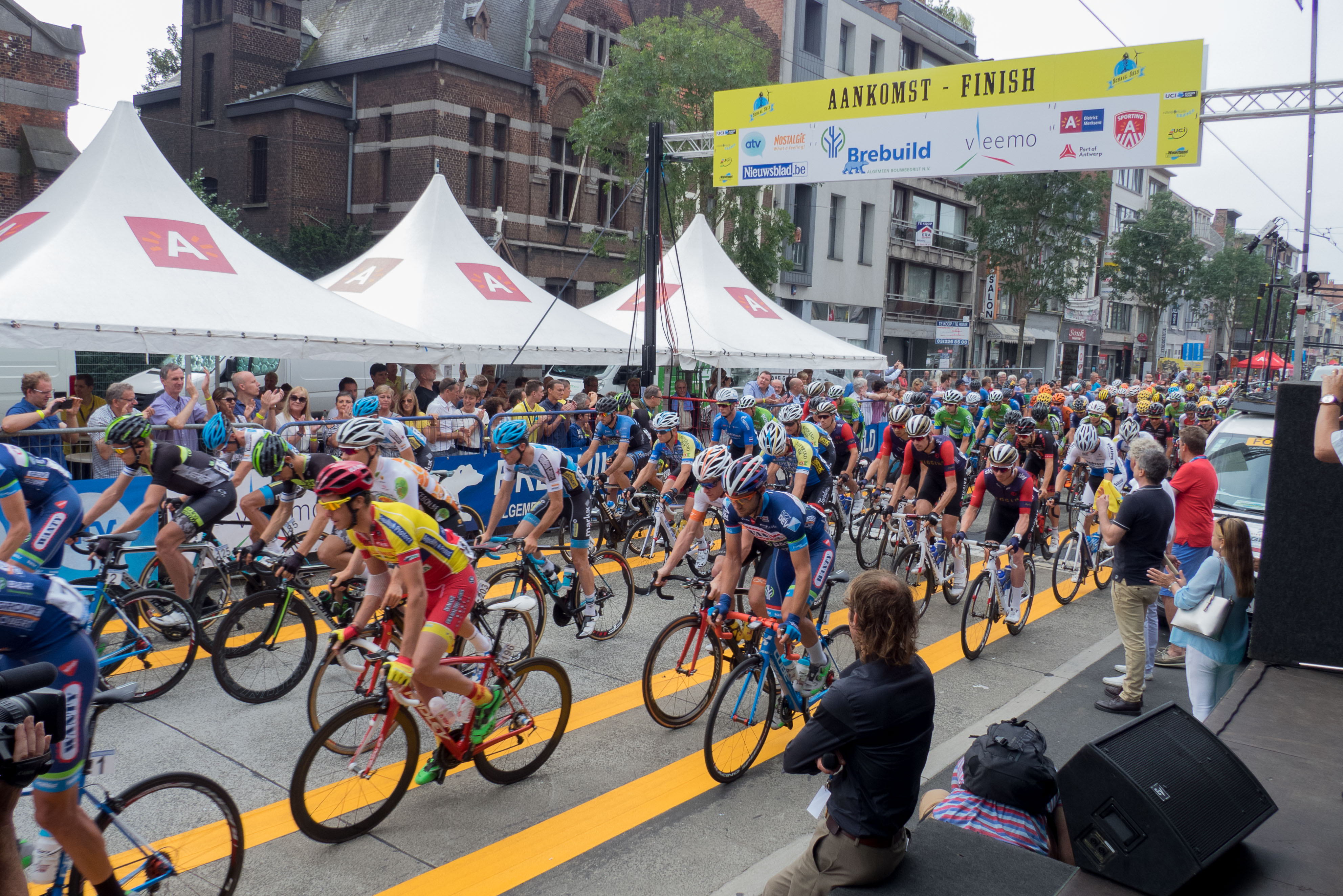 ooo